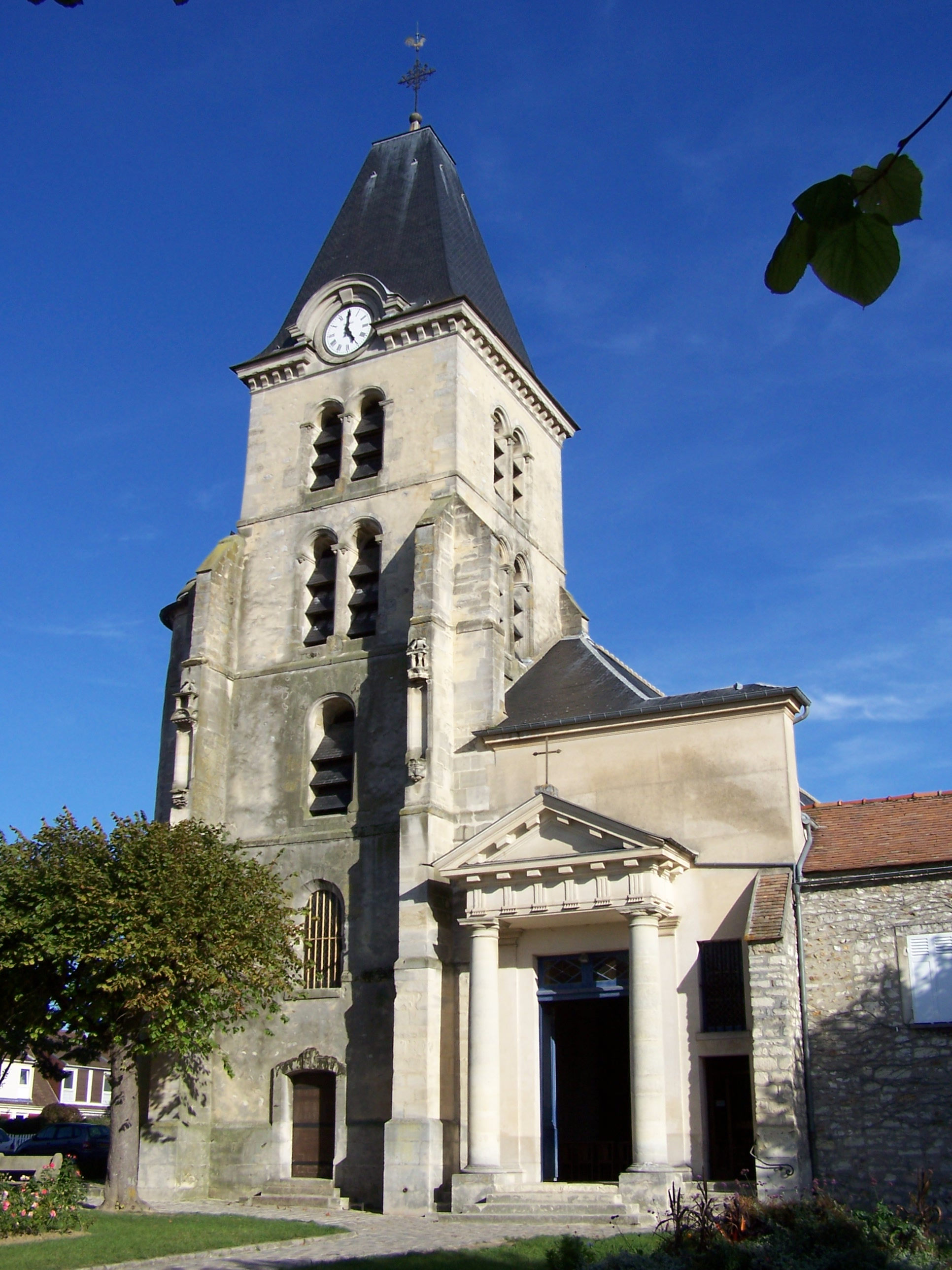 Église de Saint-Nom-la-Bretèche (Yvelines, France)